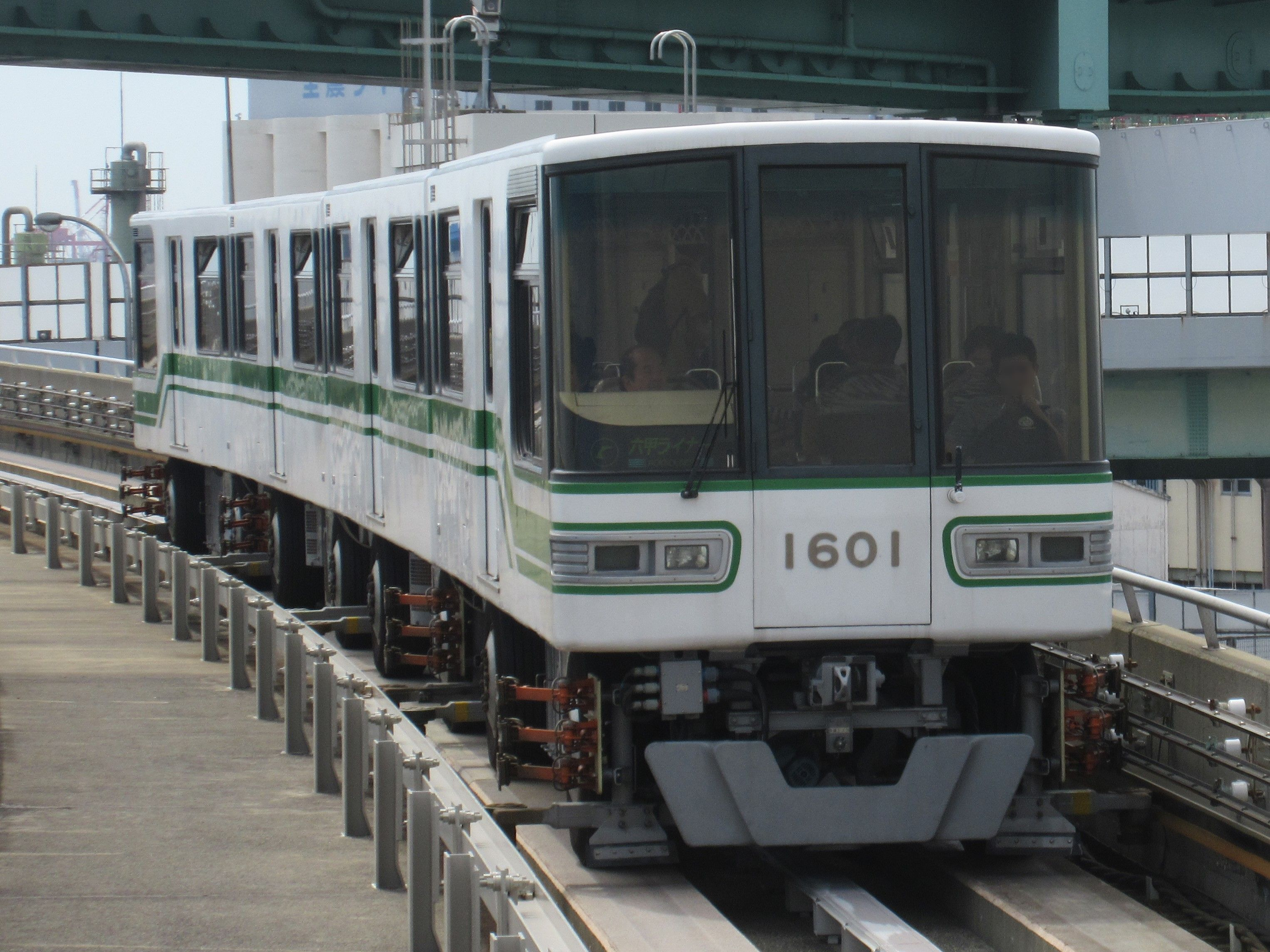 六甲ライナー1601 (南魚崎駅にて)